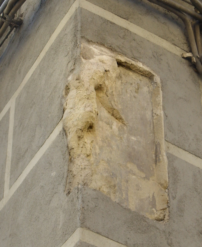 Via dell'agnolo, statua agnolo